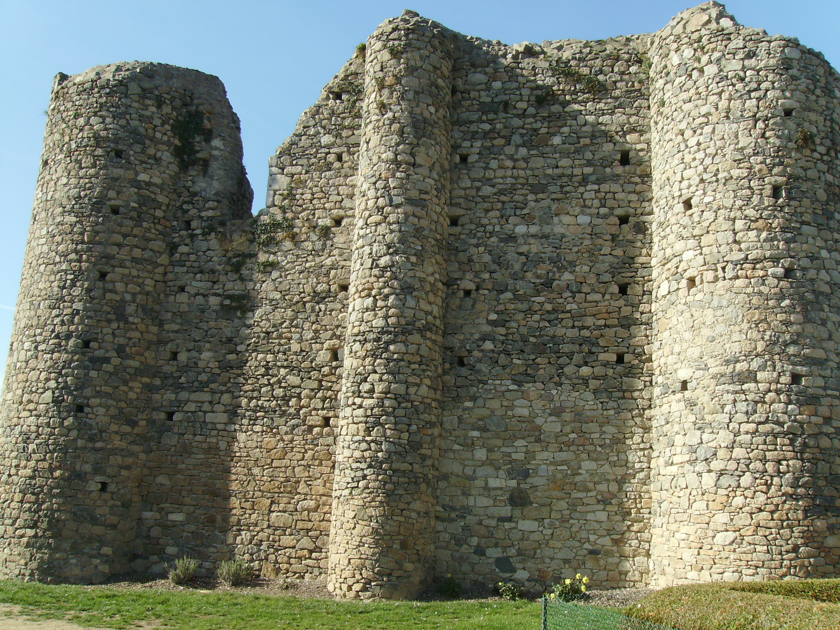 Photographie du donjon médiéval de Châteaumur, sur la commune des Châtelliers-Châteaumur en Vendée.